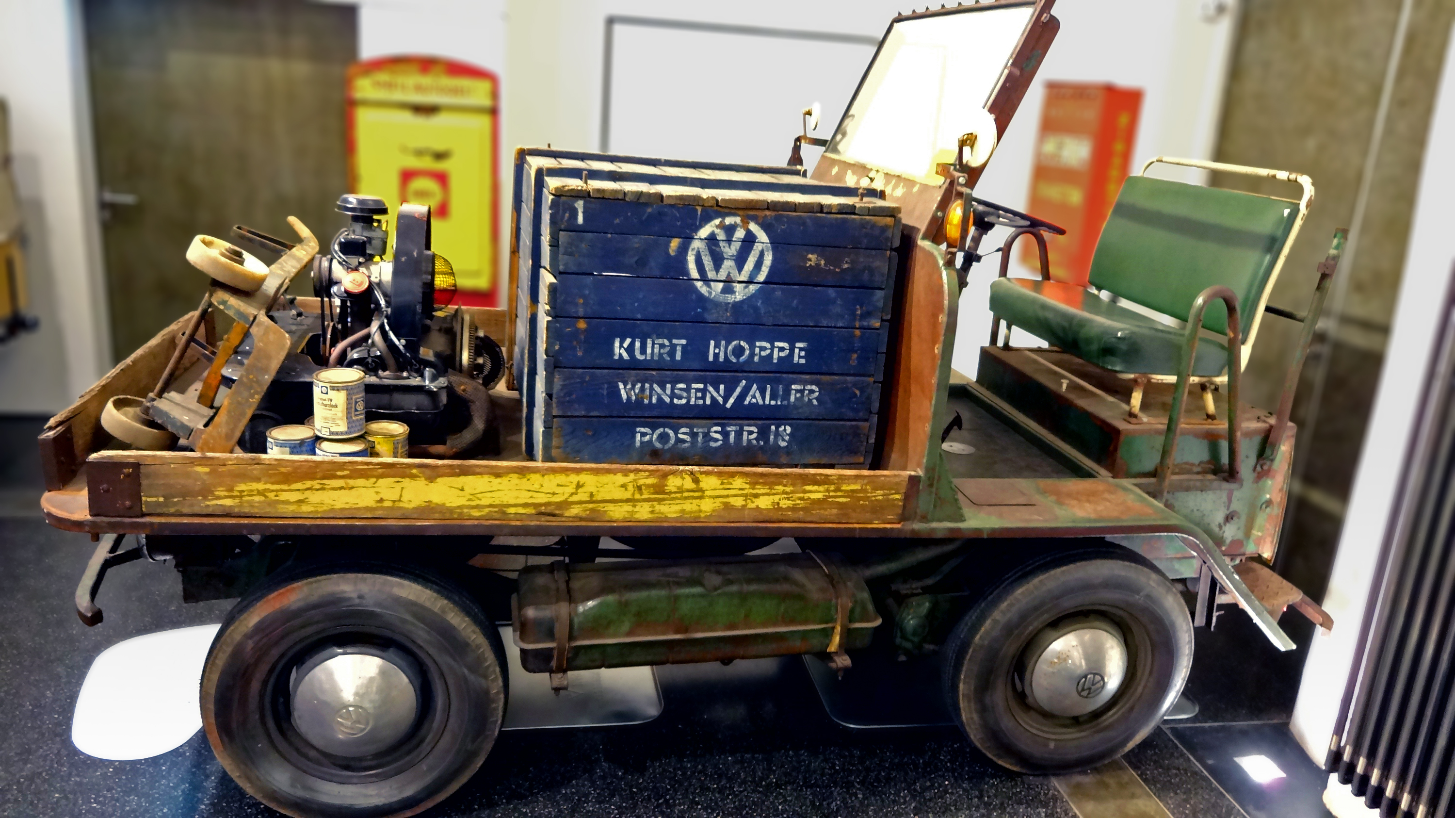 VW Plattenwagen, Baujahr: 1946, Hubraum: 1131 ccm, Leistung: 25 PS, Höchstgeschwindigkeit: 70 km/h, Gewicht: 930 kg